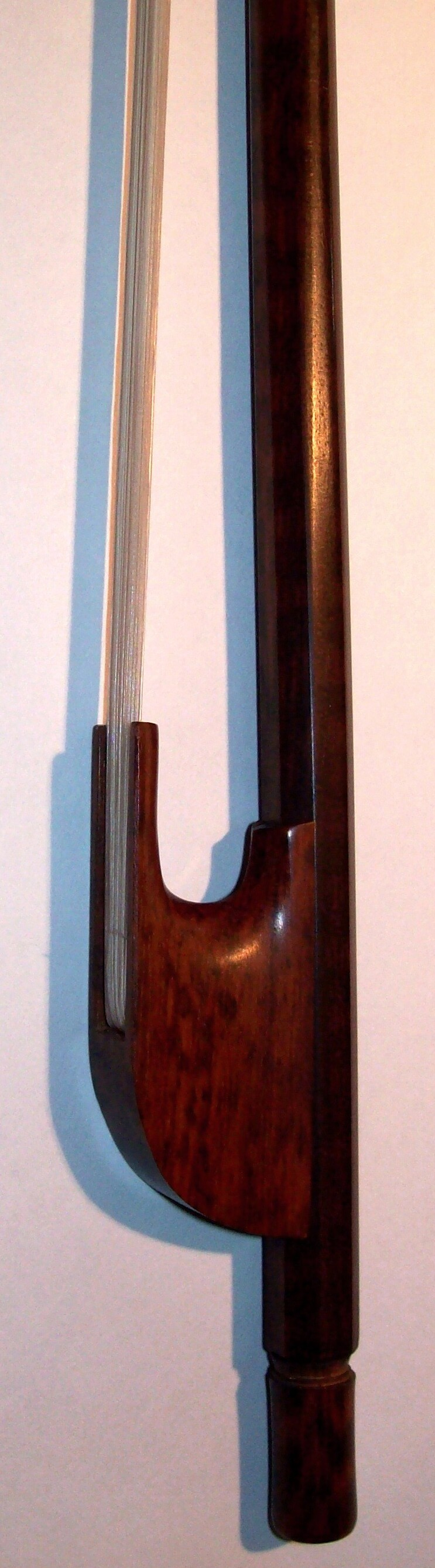 Barockviolinbogen aus Schlangenholz, Frosch